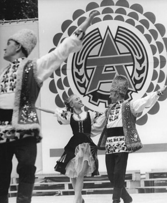 Schwerin, 14. Arbeiterfestspiele, sowjetische Tanzgruppe ADN-ZB Katscherowski 16.6.1971 Schwerin: 14. Arbeiterfestspiele- Grüße aus der Sowjetunion- Das Zentrale Volkskunstensemble der sowjetischen Gewerkschaften überbrachte am 16. Juni 1972 auf der Freilichtbühne im Schloßgarten "Grüße aus der Sowjetunion". Einen Tanz aus ihrer Heimat zeigte die Tanzgruppe aus der Nordossetischen ASSR.